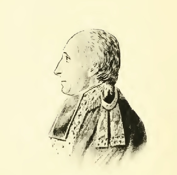 Mathieu Clavel dit Alexandre-Mathieu-Victor Clavel d'Haurimonts, poète de Montmartre (Paris, France), 1755-1834, né à Mayrac (Lot), seul portrait connu d'après l'oeuvre de Virgile Josz (édité en 1901)